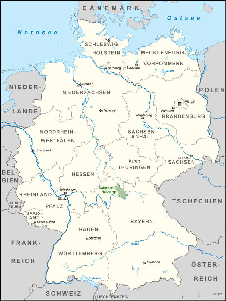 Karte des Naturparks Haßberge in Deutschland